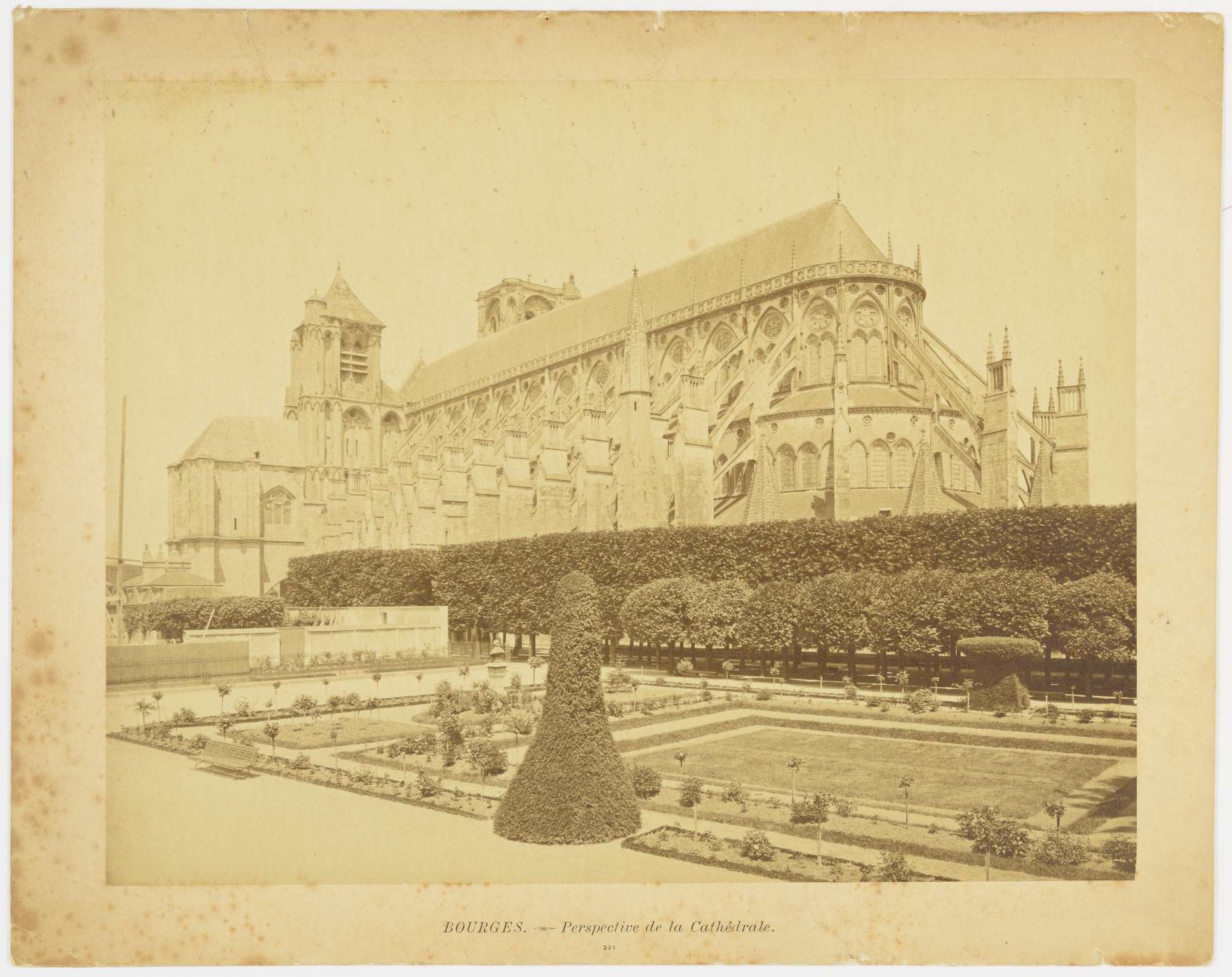 Bourges - perspective de la cathédrale : vue extérieure côté nord et chevet depuis les jardins avec une taupière au premier plan. Inscription imprimée sur le carton BOURGES. – Perspective de la Cathédrale /201. Échelle : 2 cm / 1 m. Photographie issue des dossiers de travaux de restauration des cathédrales (1802-1912, conservés aux Archives nationales (inventaire et documents numérisés consultables en ligne).